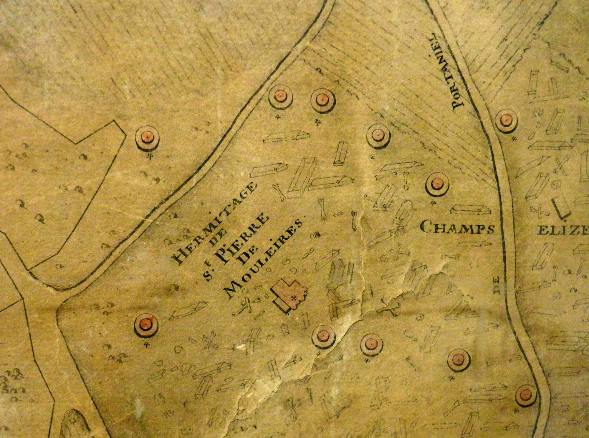 Plan de la ville d'Arles et de ses environs de 1743 conservé à la médiathèque d'Arles (France). Vue partielle représentant l'ancienne église Saint-Pierre-et-Saint-Paul des Mouleyrès d'Arles au milieu des tombes.